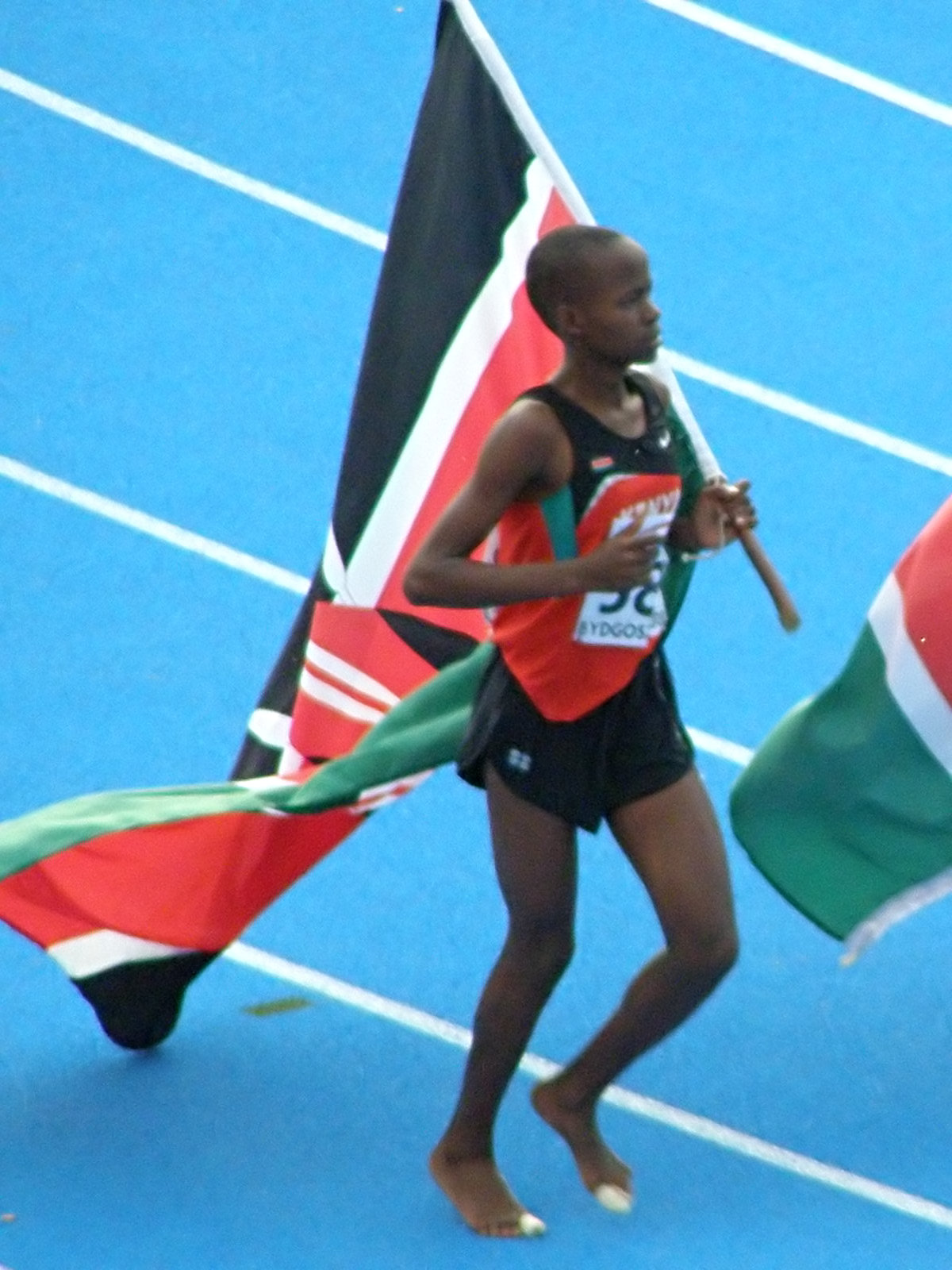 Mistrzostwa Świata Juniorów w Lekkoatletyce - Bydgoszcz 2008 - Christine Kambua Muyanga - złota medalistka w biegu na 3000m z przeszkodami